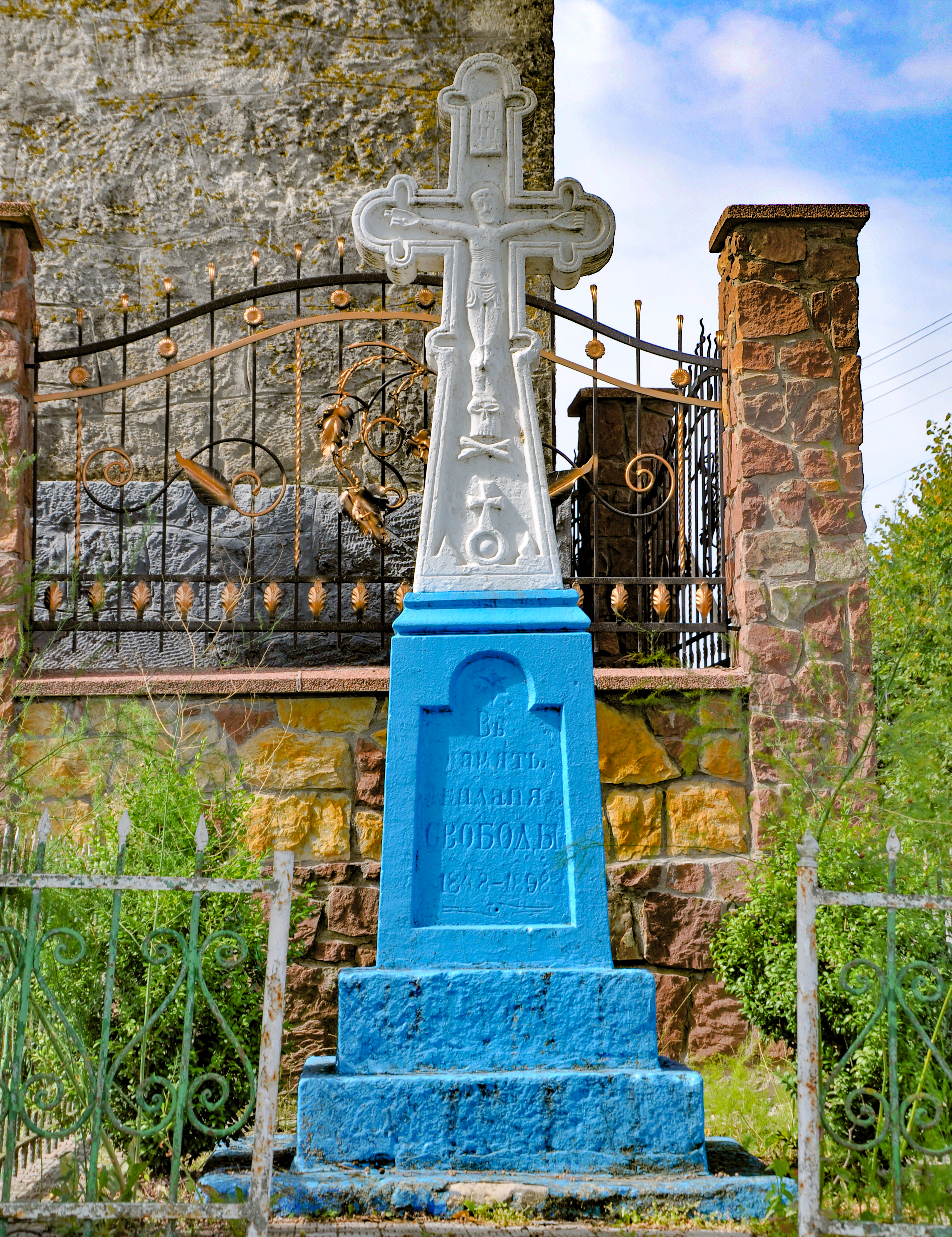 Пам'ятний хрест на честь скасування панщини (вул. С. Чарнецького) в селі Шманьківці Чортківського району Тернопільської області України.